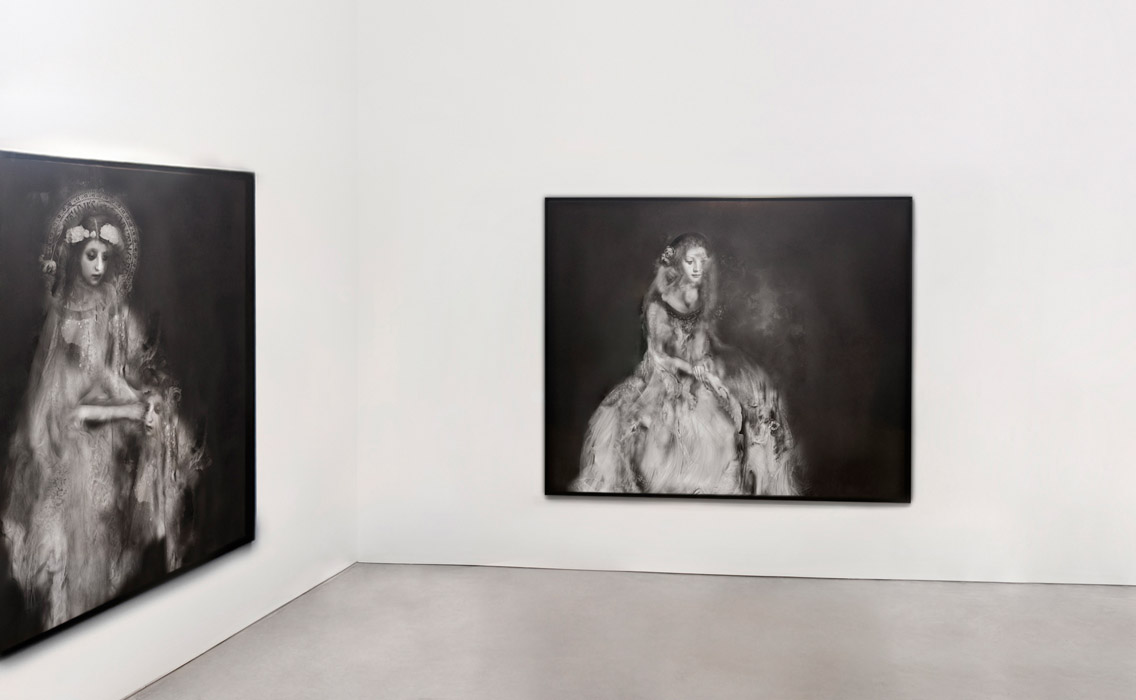 Exposition Thomas Devaux Hong Kong